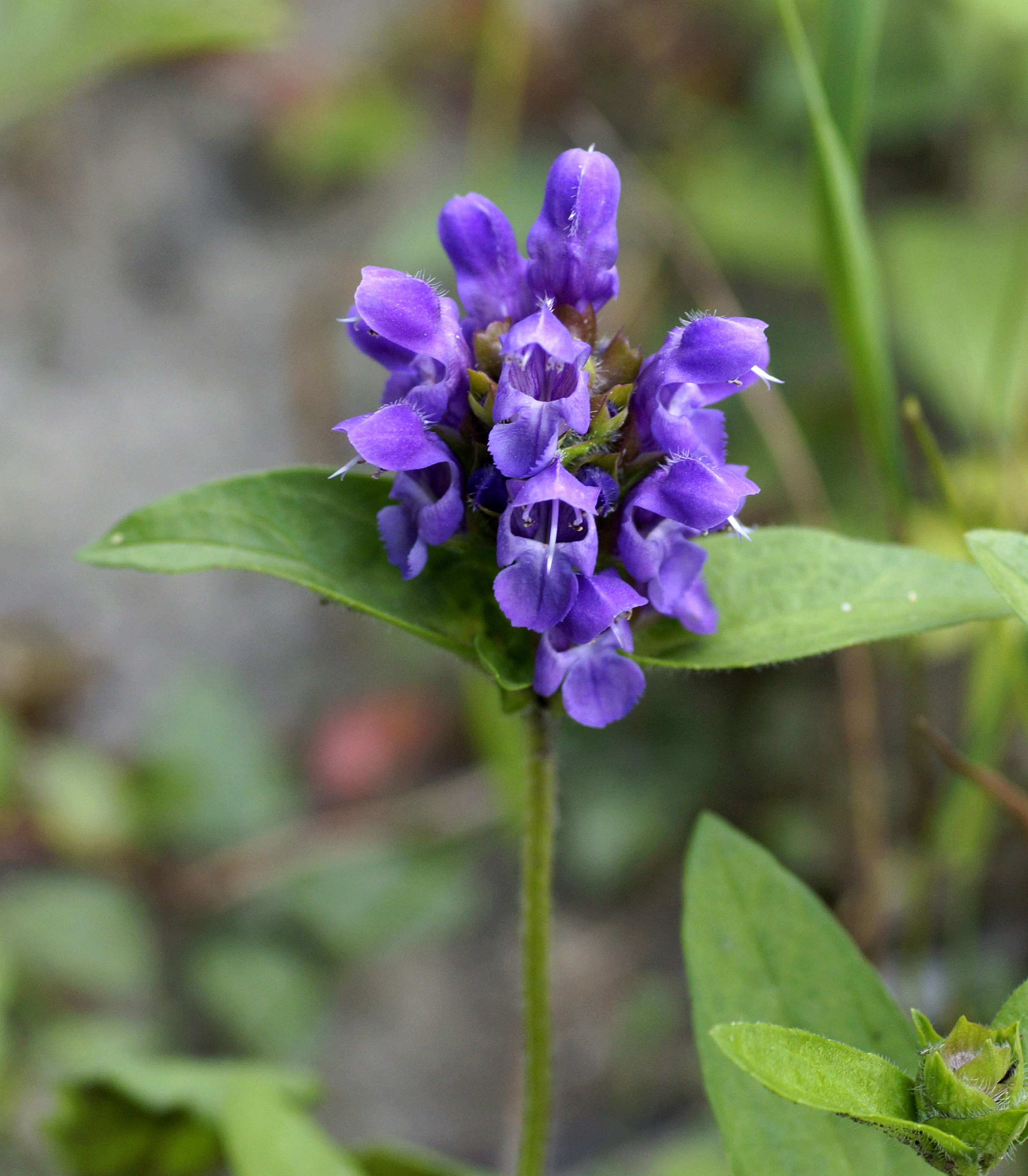 Großblütige Brunelle, Lamiaceae Deutschland, Oberstdorf, Stillachtal, 940 m Photo: U.Schmidt, 17.VII.2013